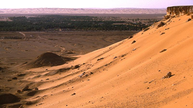 El Golea, die Stadt der 200.000 Dattelpalmen. Blick von der Steilstufe der Transsaharastraße.